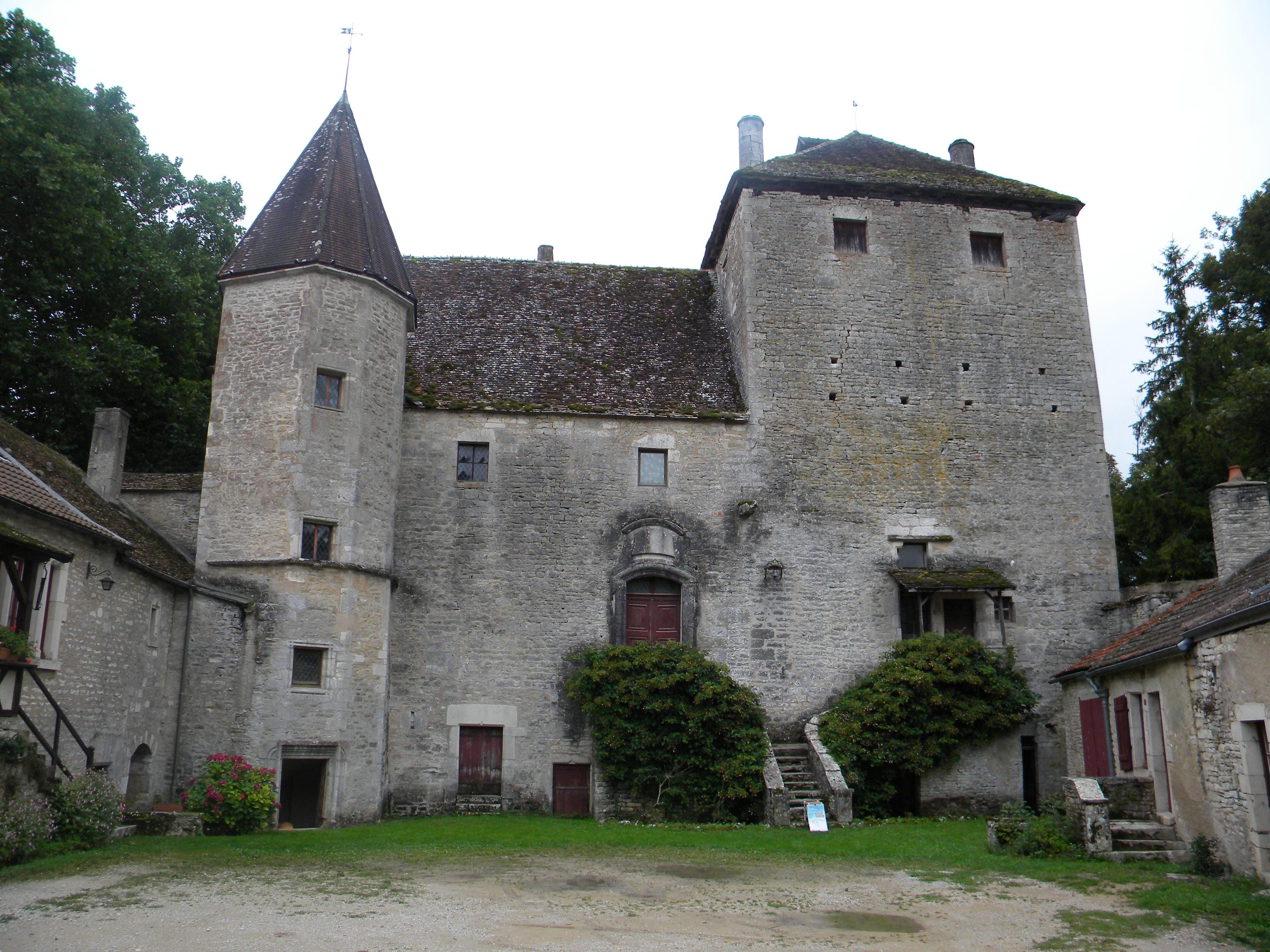 Maison forte de Gamay